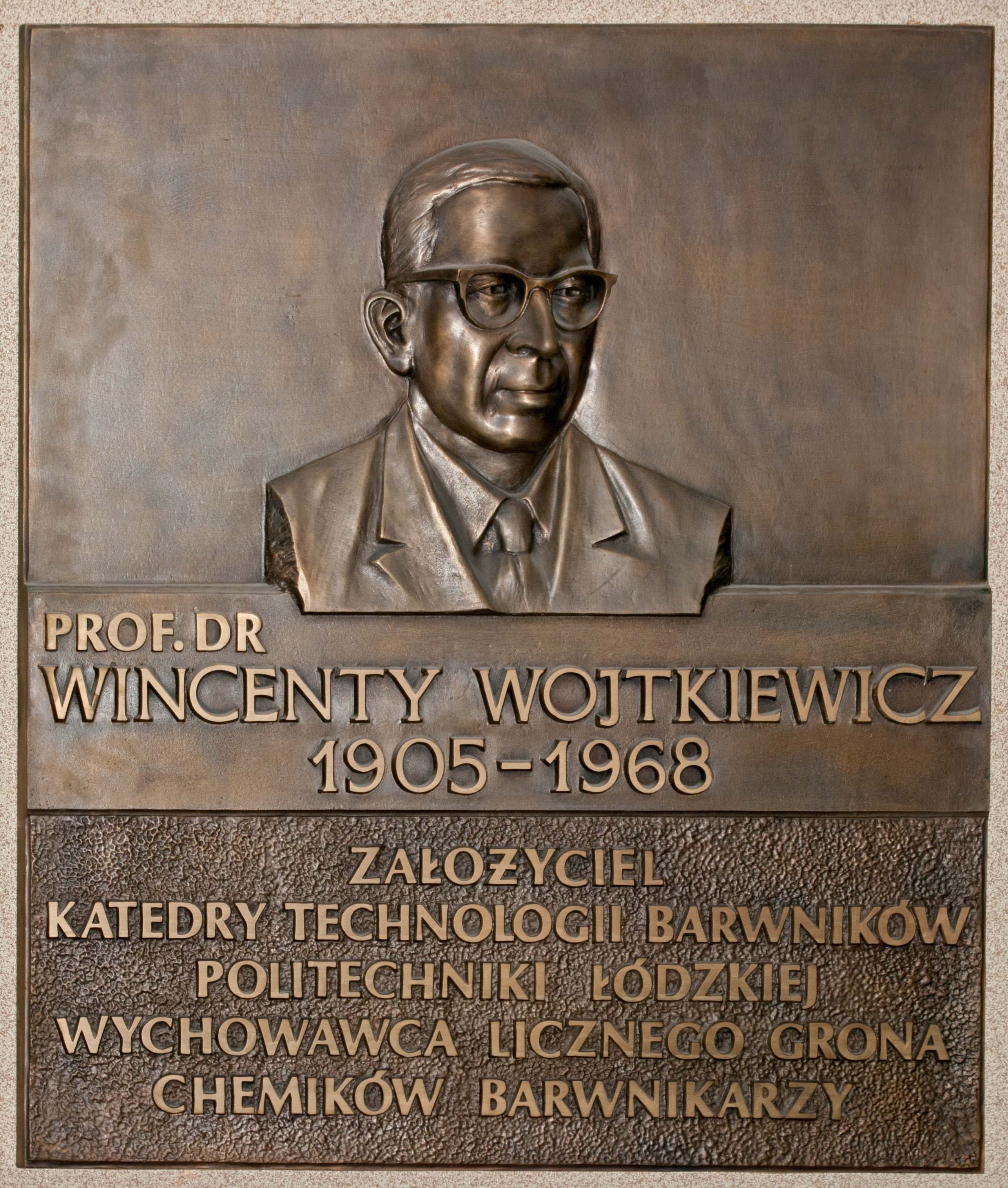 Tablica pamiątkowa prof. Wincentego Wojtkiewicza